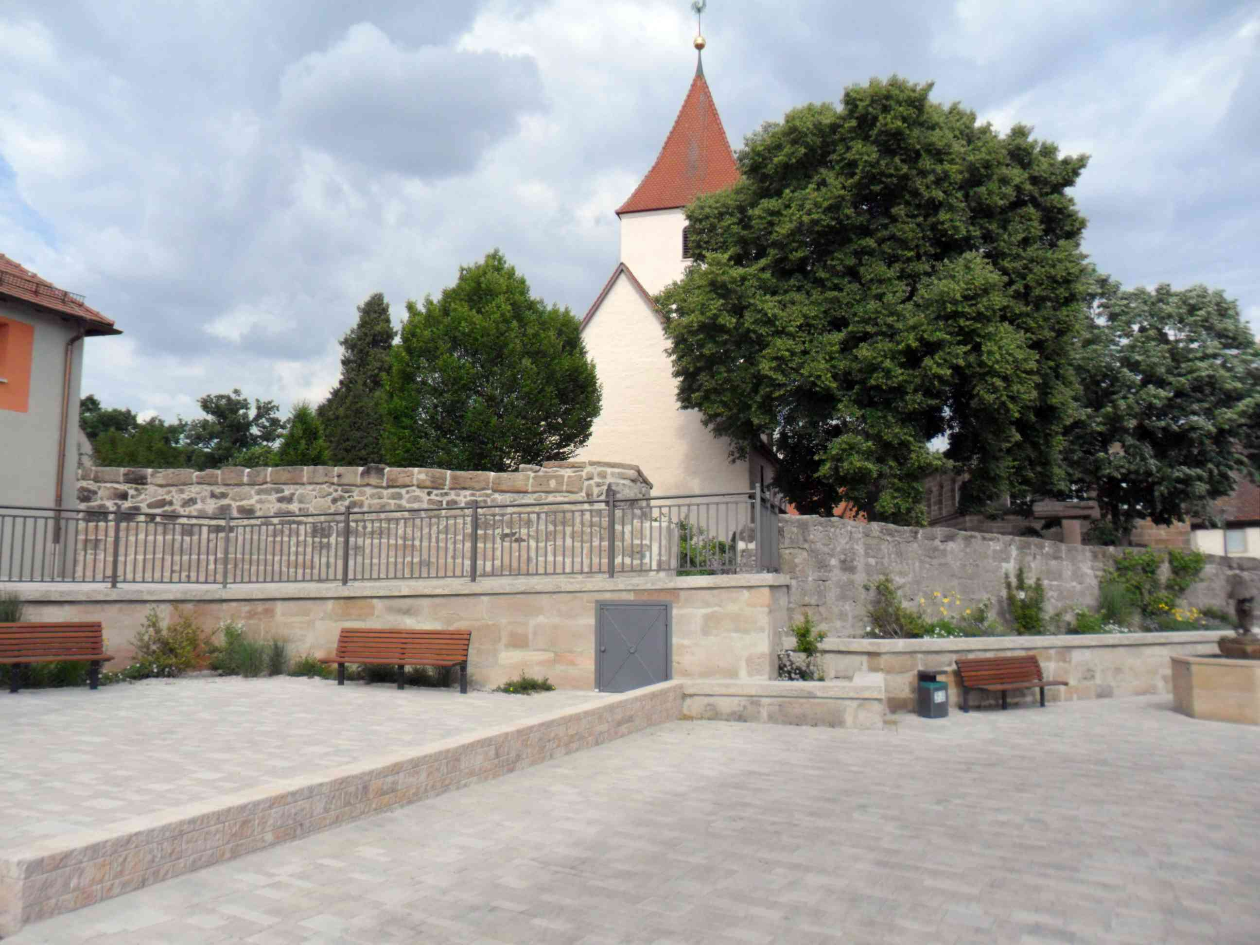 Obermichelbach-Ansicht von Westen mit Kirche über Kirchhofmauer und ehemaligem Grabenvorfeld (jetzt aufgefüllt und gepflastert)-28052012